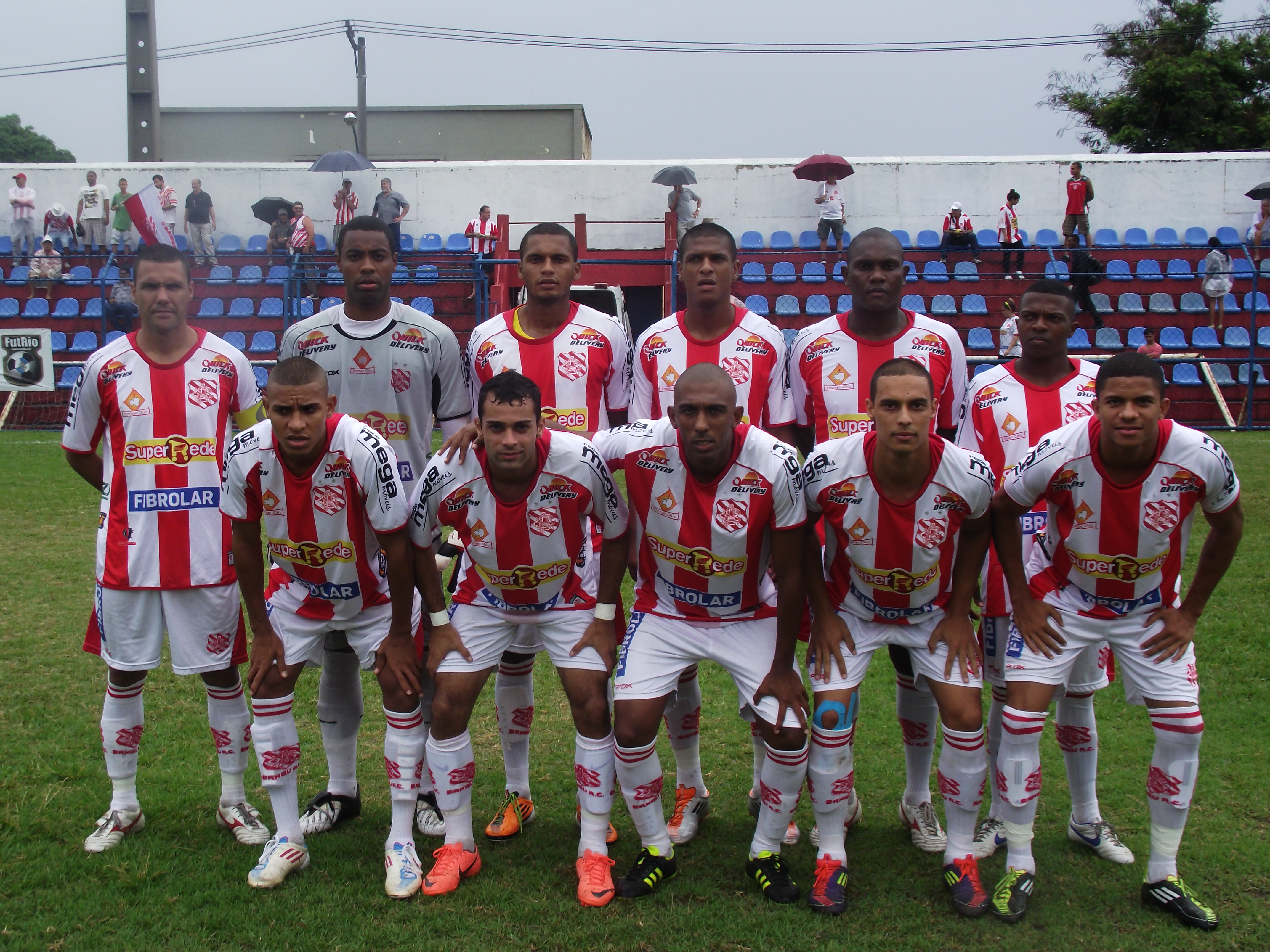 Equipe profissional do Bangu na disputa da Copa Rio em 2012.